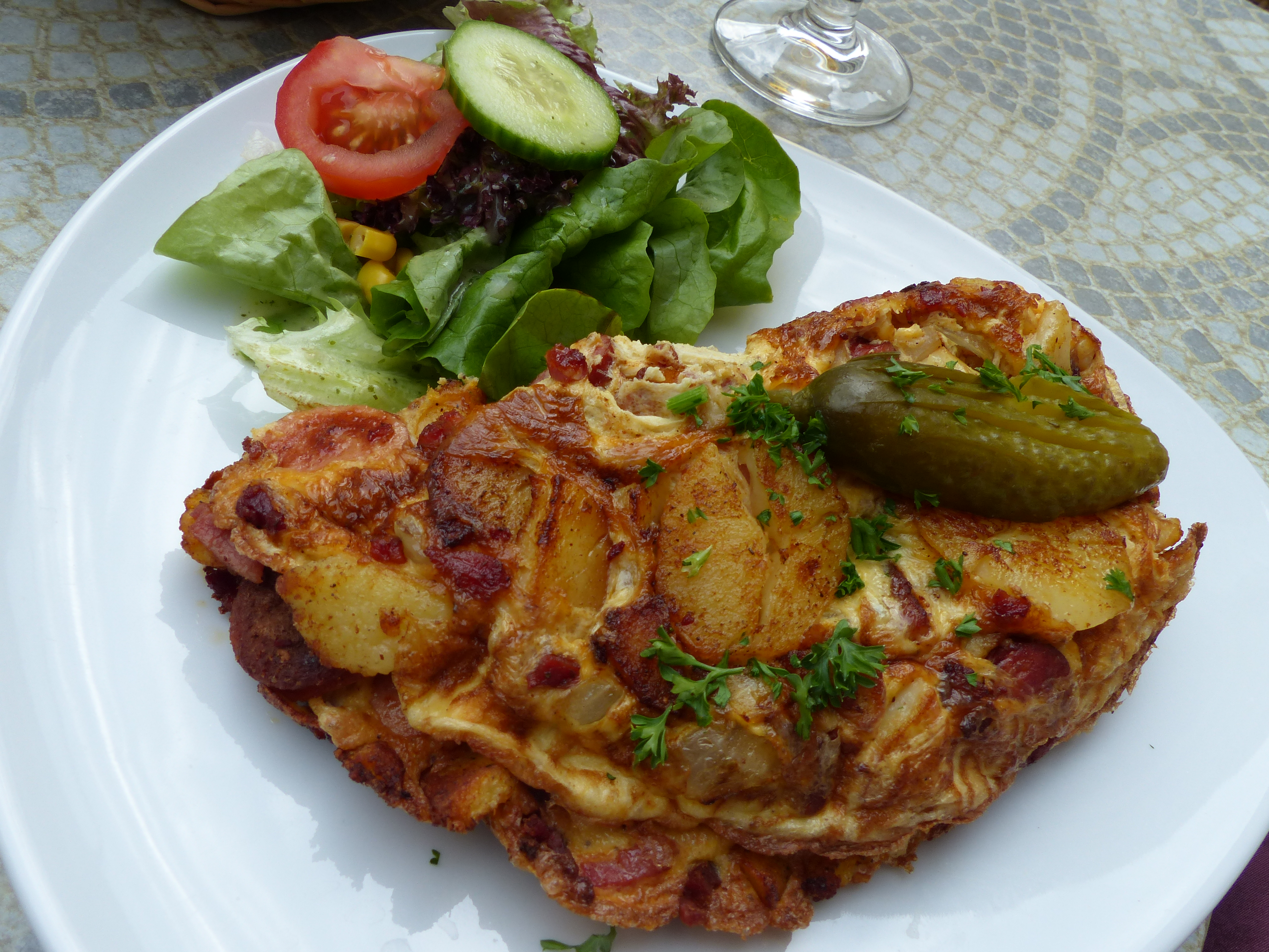 Bauernfrühstück, Ratscafe in Görlitz (Sachsen)